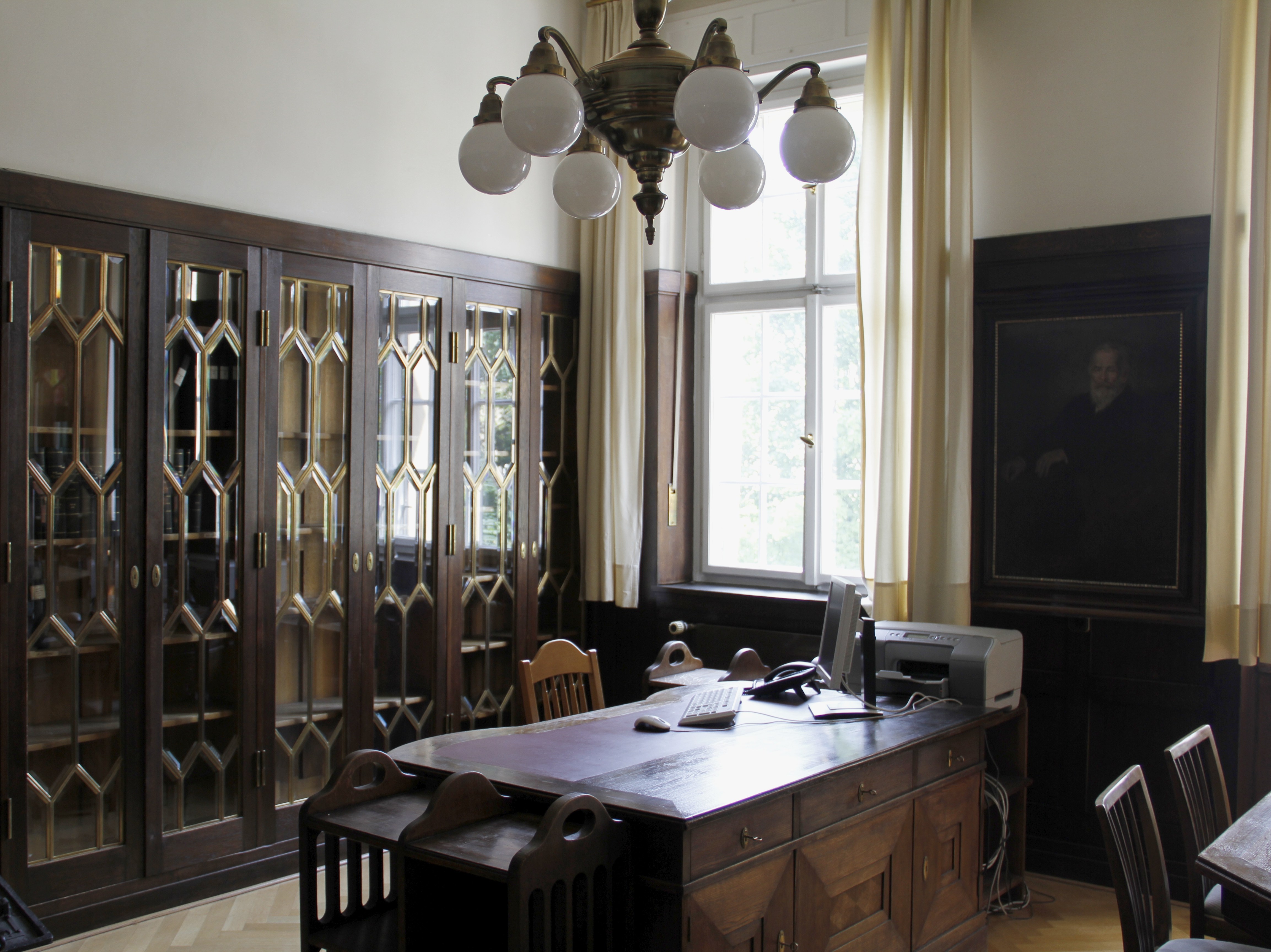 Hauptzollamt München, Vorsteherbüro im Originalzustand aus der Bauzeit 1912